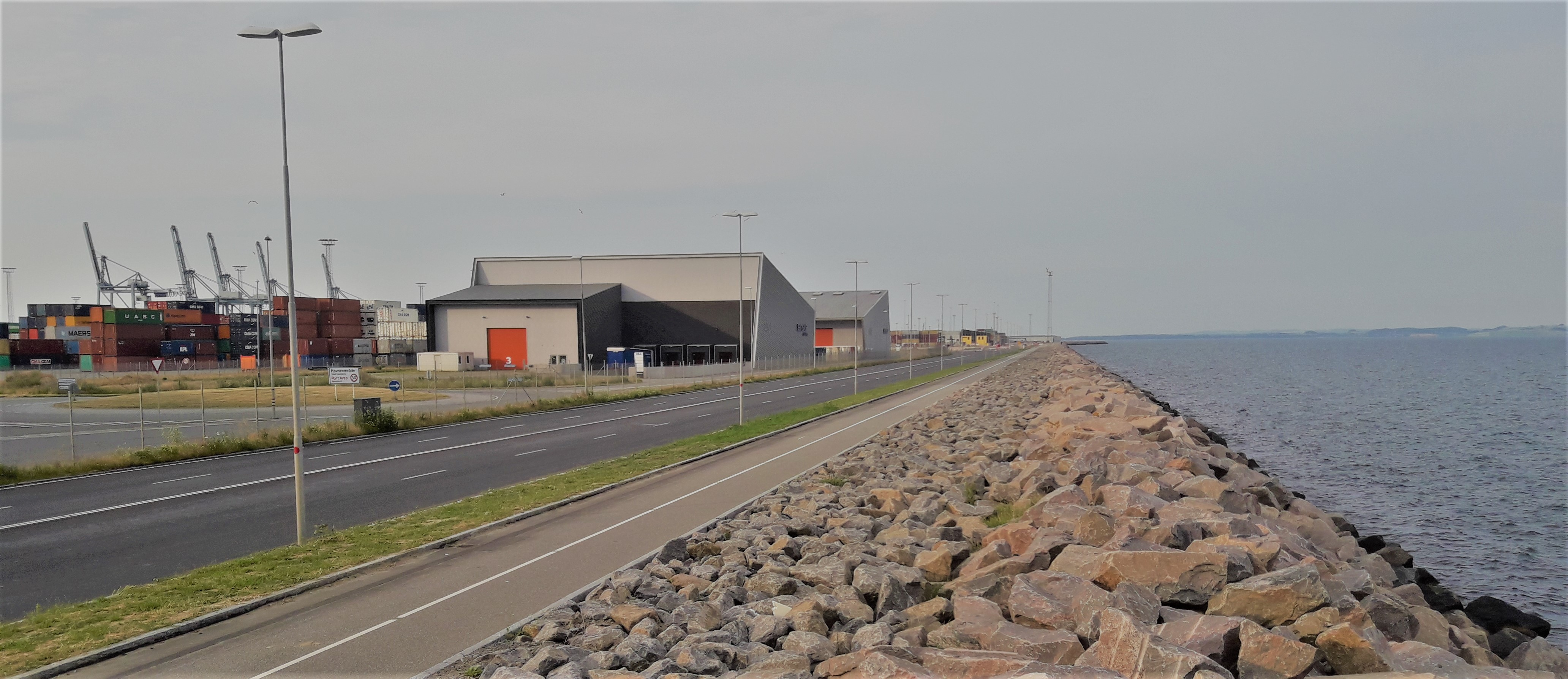 Østhavnsvej i nordøstgående retning, til den nye færgeterminal.